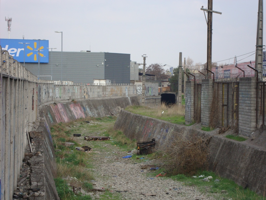 Túnel Matucana, vista avertura norte, además se puede apreciar el recorrido de la levantada vía que unía a la estación Yungay con Estación Central